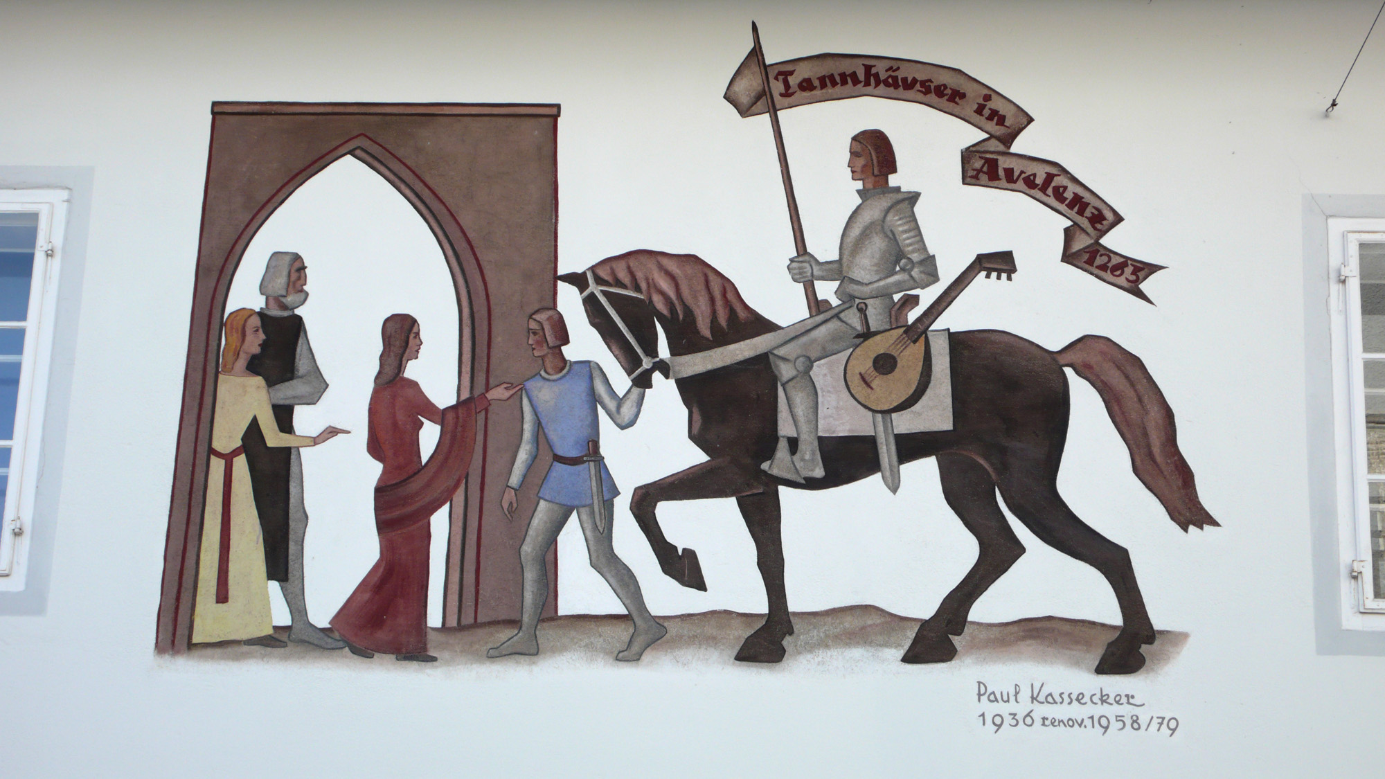 Fassadenmalerei am Haus Mariazellerstraße in Aflenz Kurort